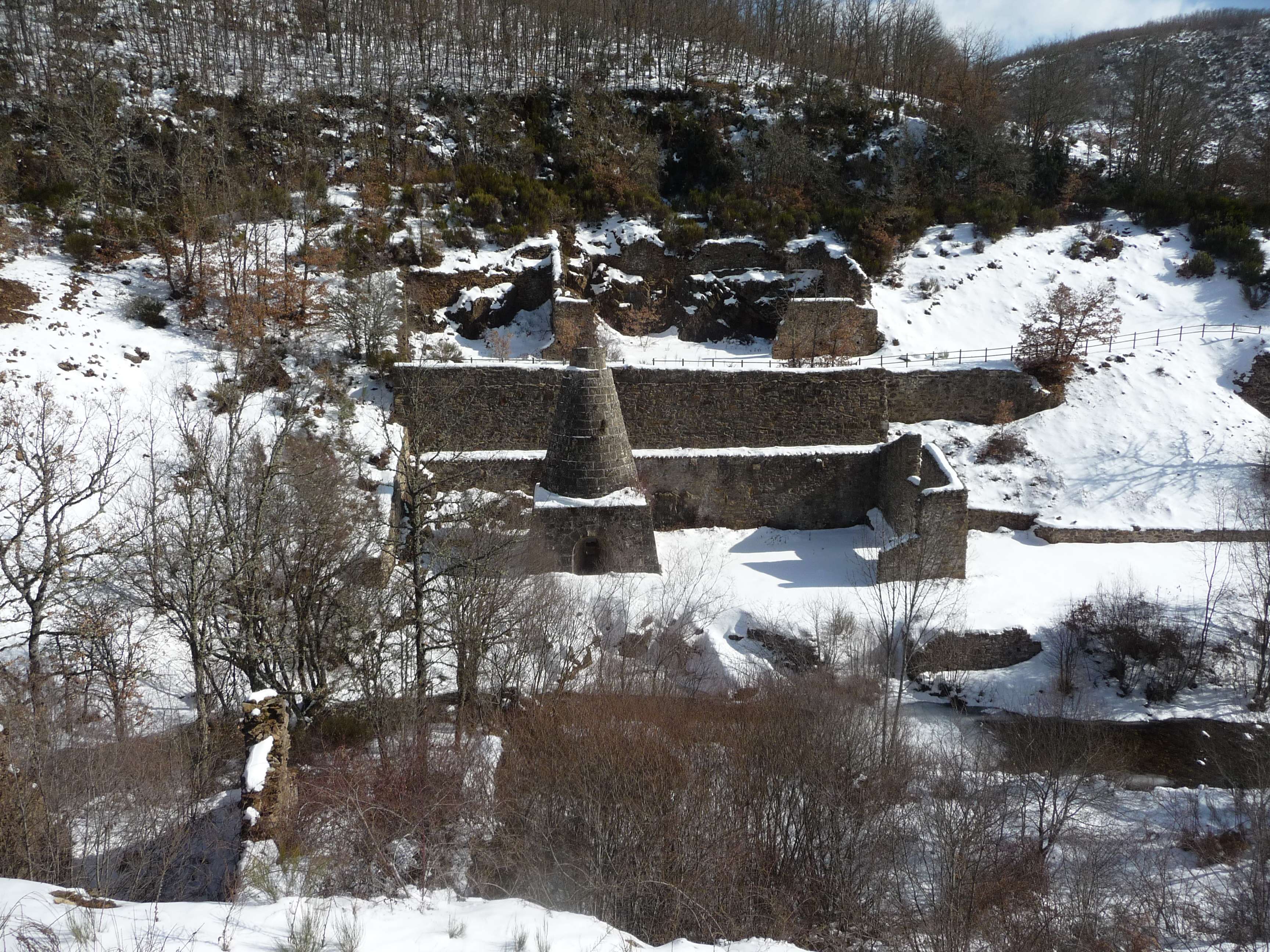 Ferreria ubicada en Barbadillo de Herreros (Burgos)